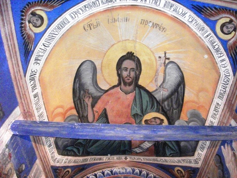 Фреска в църквата „Свети Димитрий“ в селото Страцин, Кратовско.